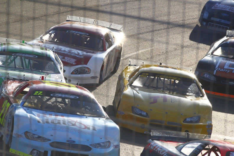 Stock car sur courte piste asphaltée - Série PASS North - Autodrome Chaudière - 18 mai 2013 - Photo Paul-Émile Poulin-Jacques